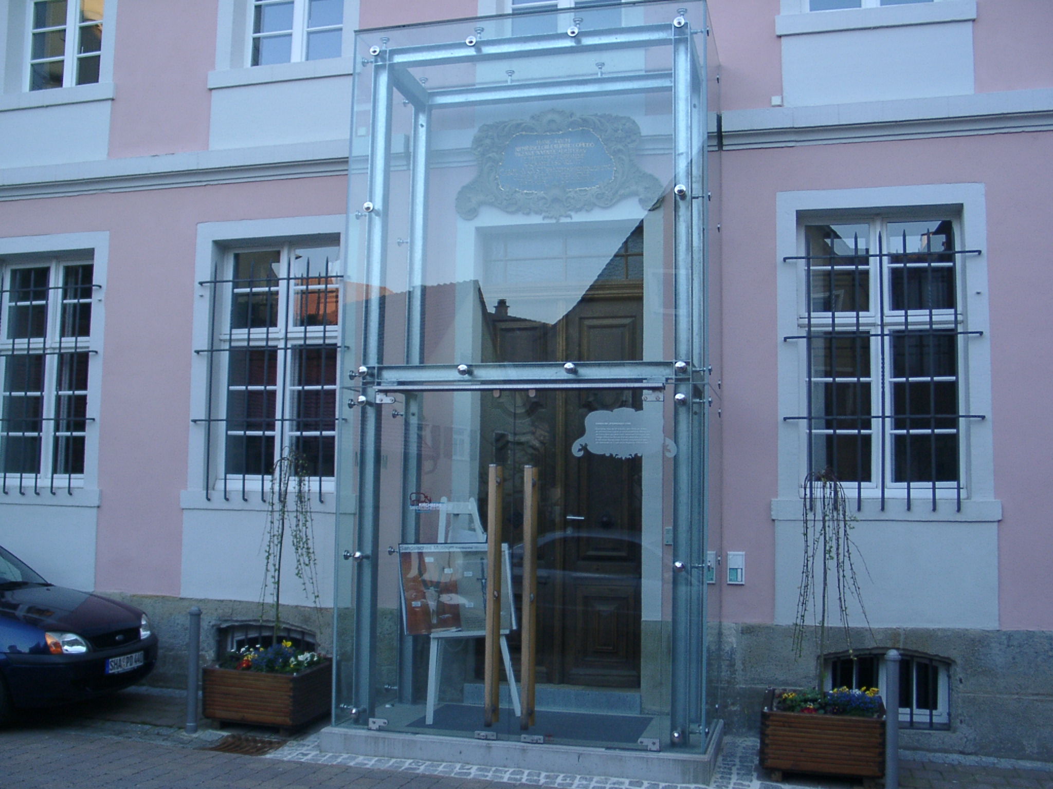 Eingang zum Sandelschen Museum in Kirchberg an der Jagst